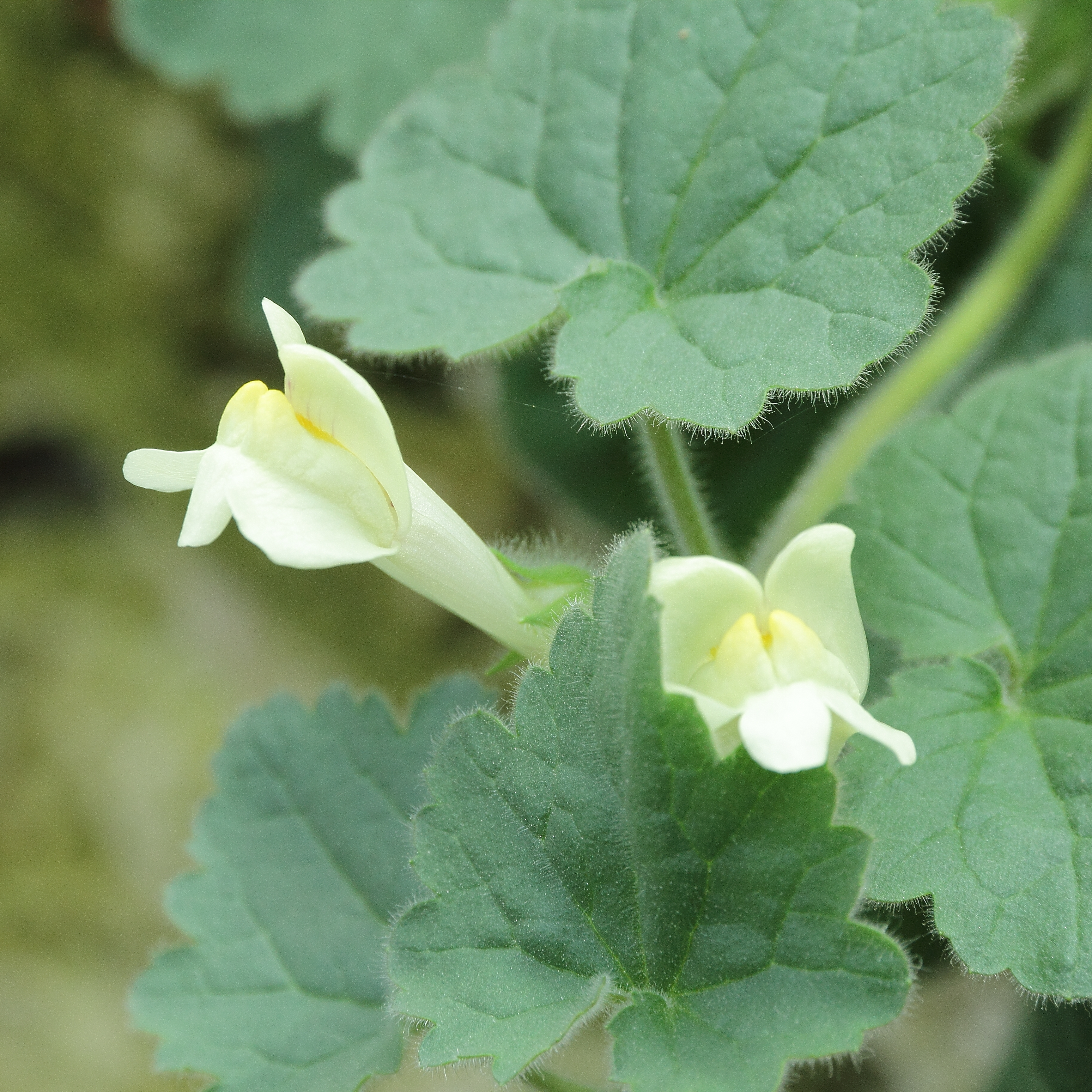 Asarina procumbens i Bergianska trädgården.